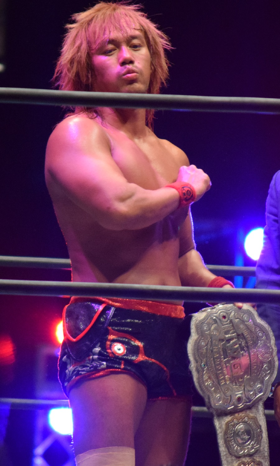 2016年9月25日 ワールド記念ホール「DESTRUCTION in KOBE」 内藤哲也